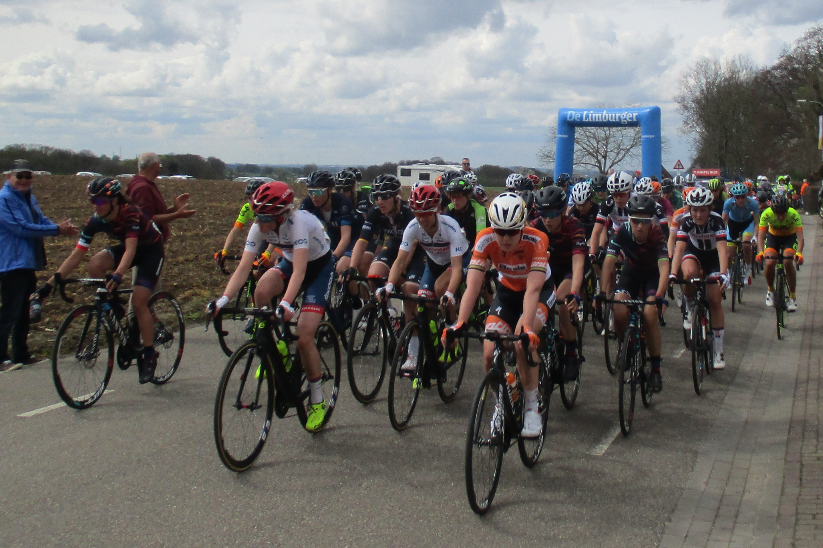 3e (en laatste) doorkomst Gasthuis in de Amstel Gold Race Ladies Edition 2018.